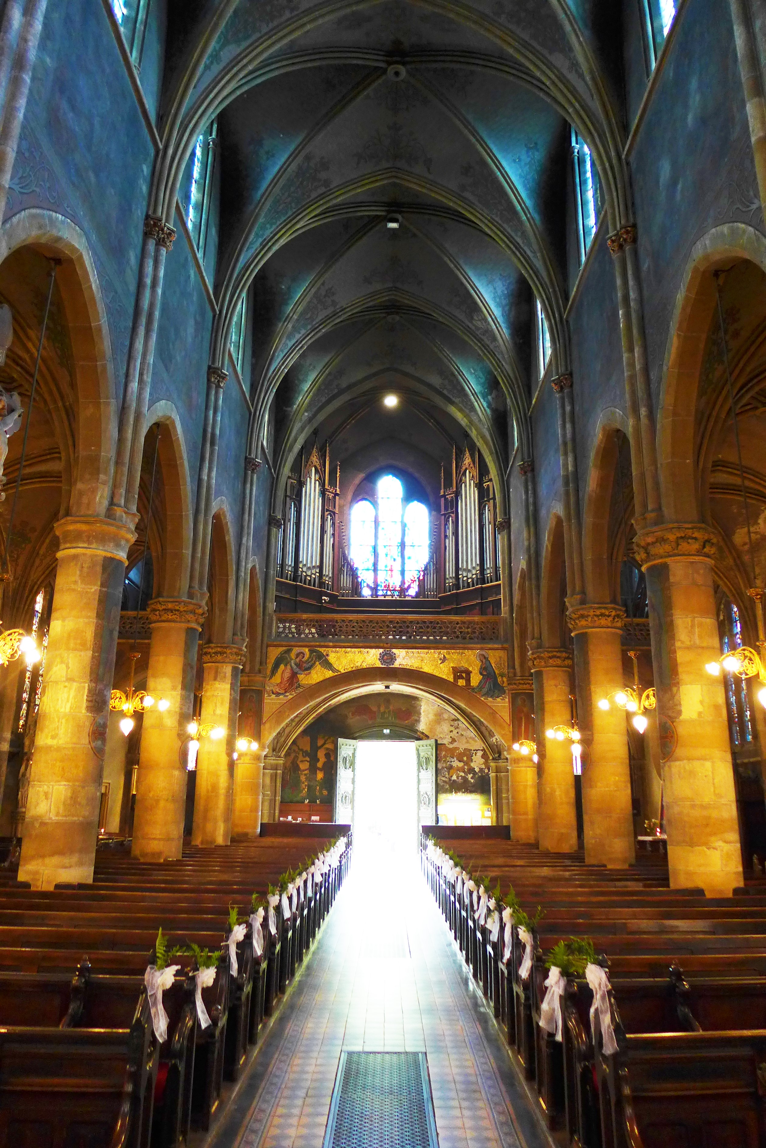 St. Segolenakirche (Metz), Inneres mit Blick zur Orgelempore